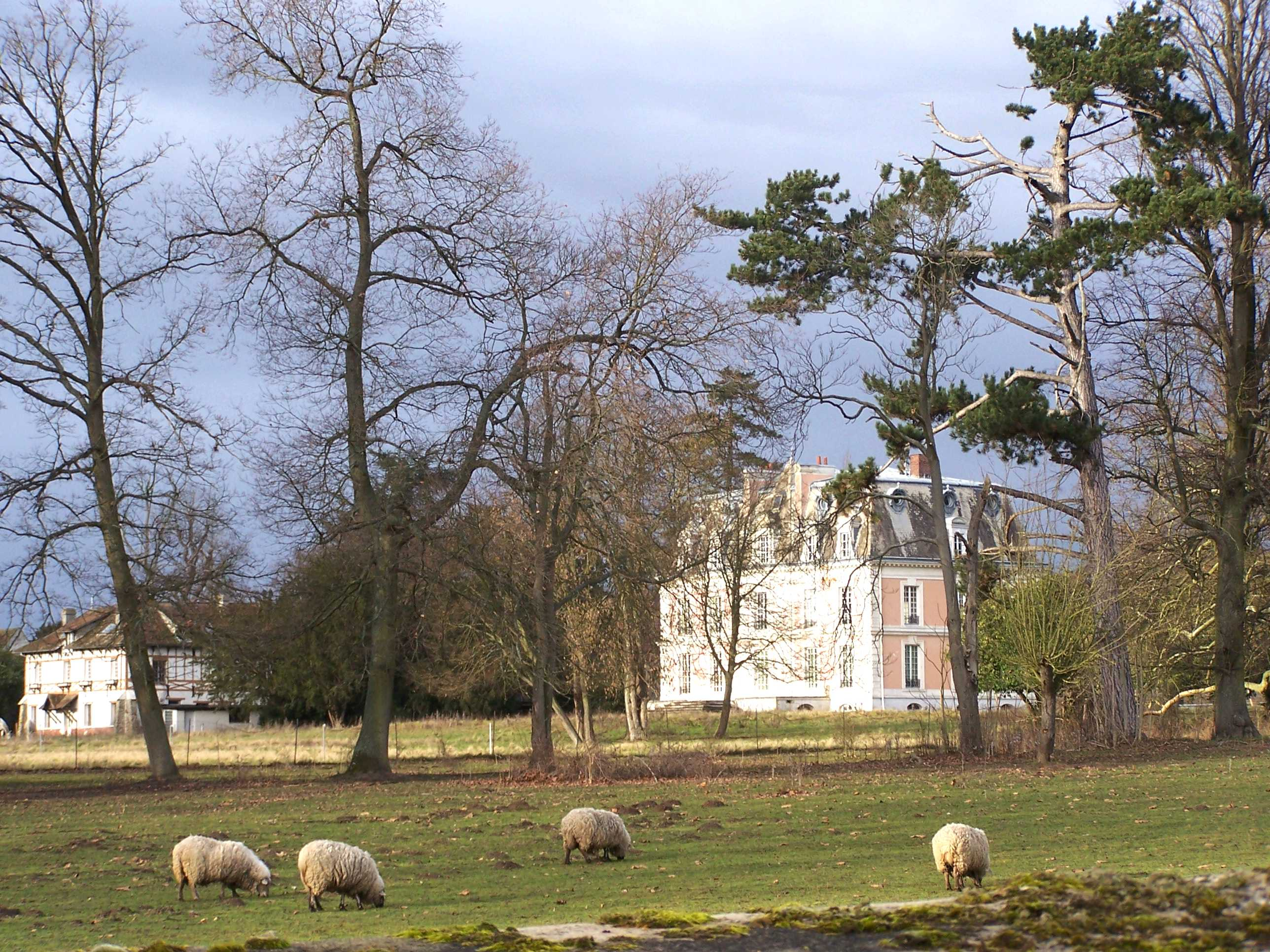 Château de Boulémont à Herbeville (Yvelines, France)